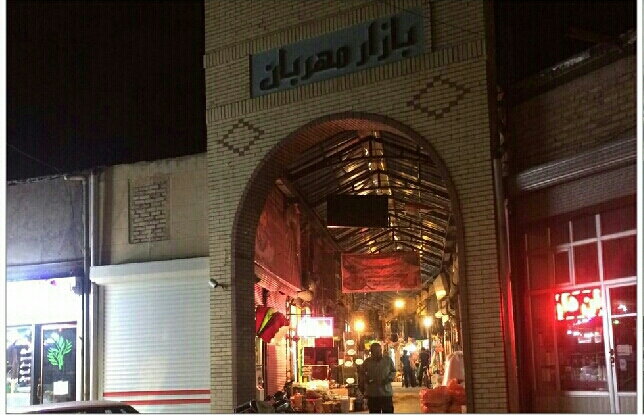 بازار قدیمی مهربان